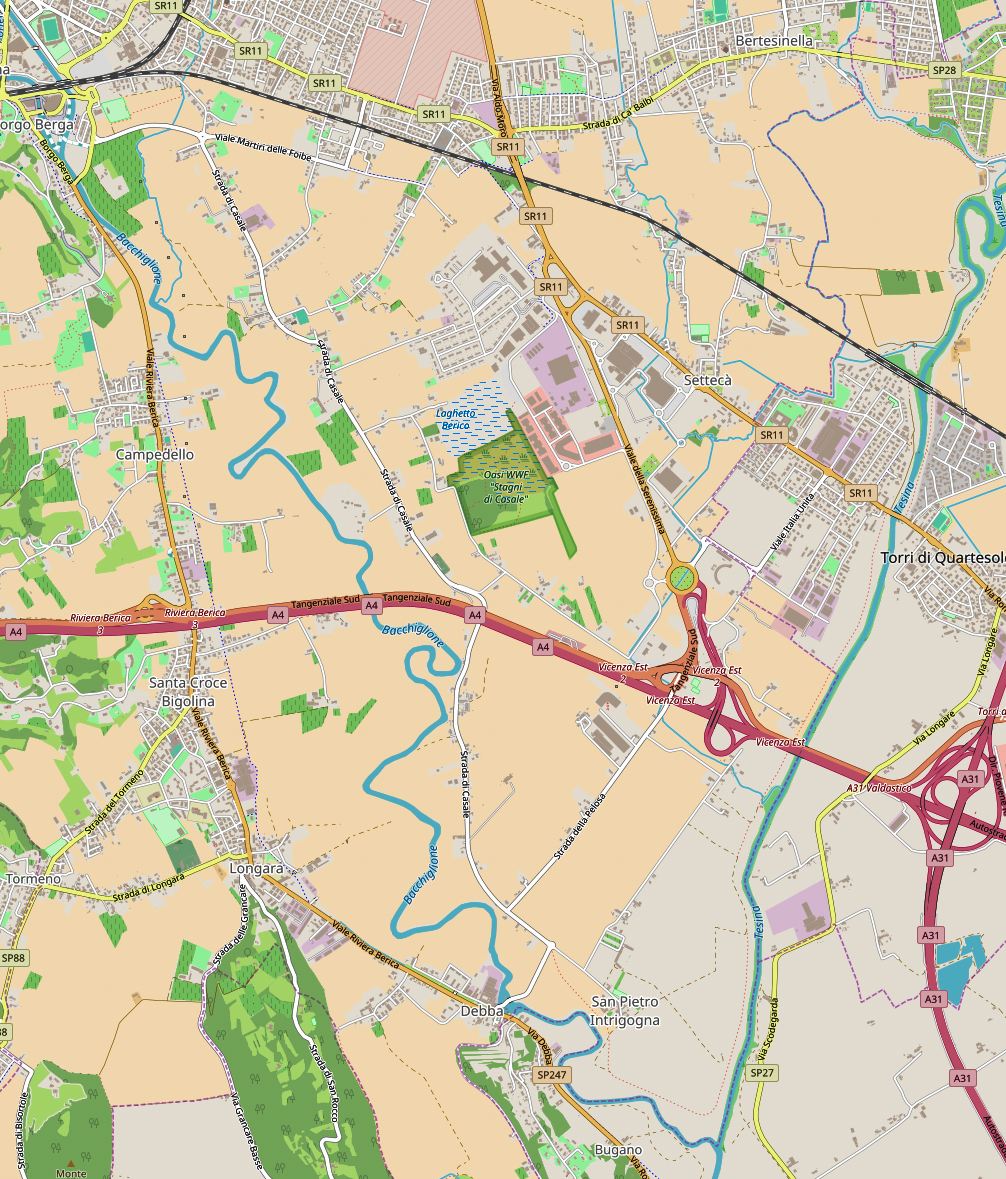 Mappa della zona Ca' Impenta, Setteca', Oasi WWF di Casale, San Pietro Intrigogna